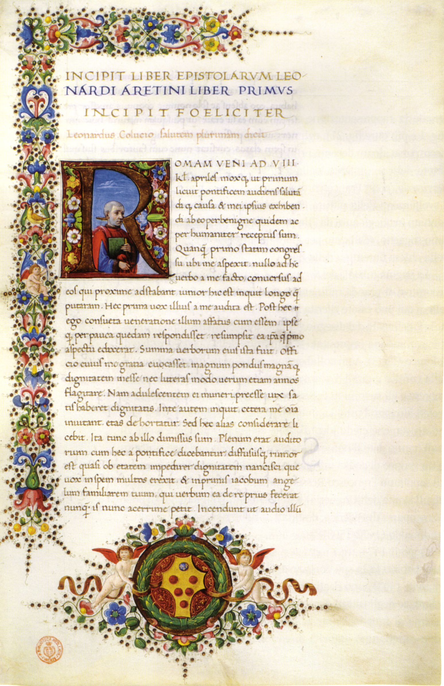 Gherardo di giovanni del fora, in epistolae di leonardo bruni, bibl medicea laurenziana, pluteo 52.6 f 1r